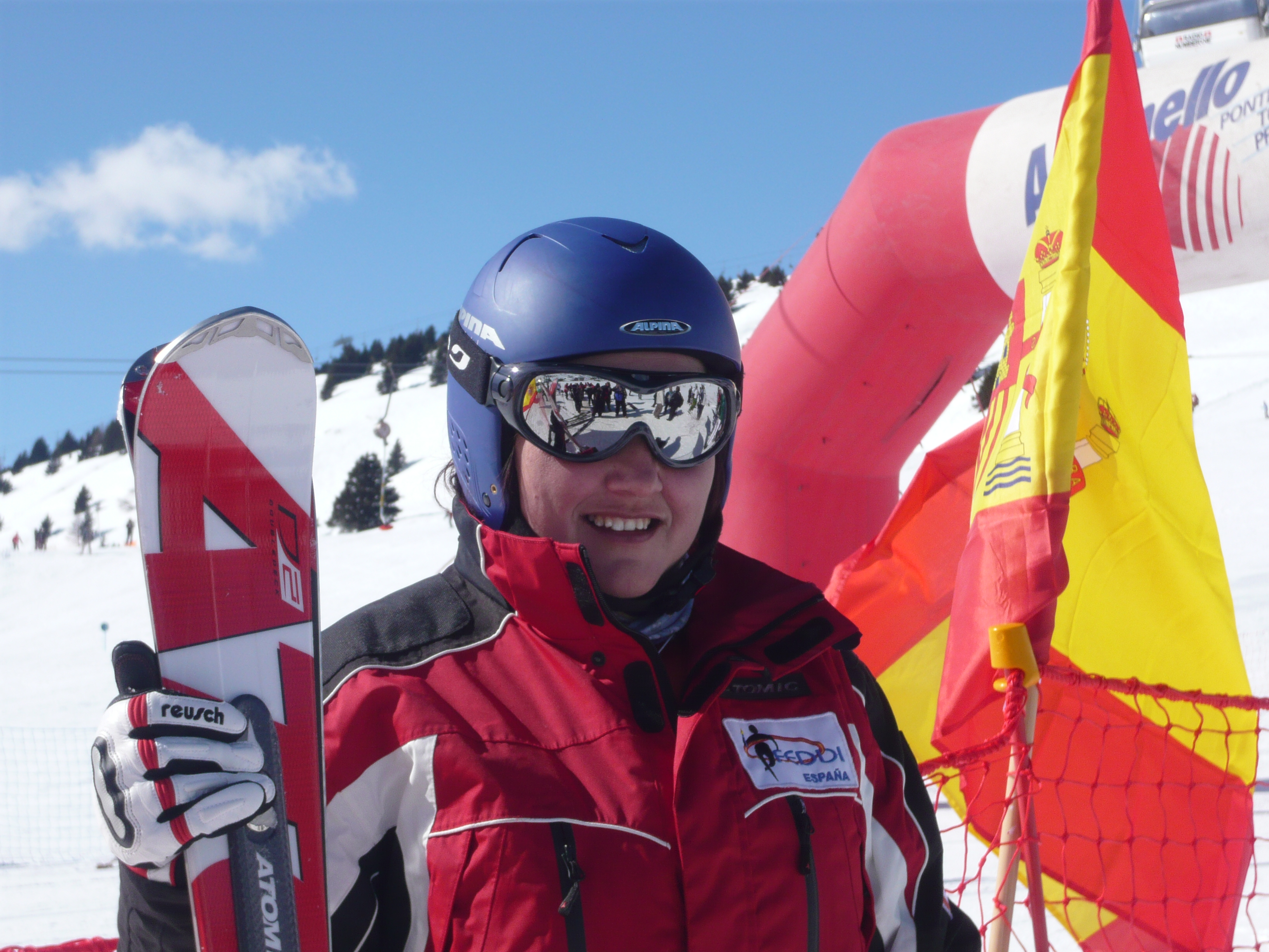 Beatriz Vila representando a España en el Campeonato del Mundo de Esquí 2010 celebrado en Italia